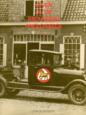 Oud boek over de geschiedenis van brouwerij Anglo Belge - Zulte - België